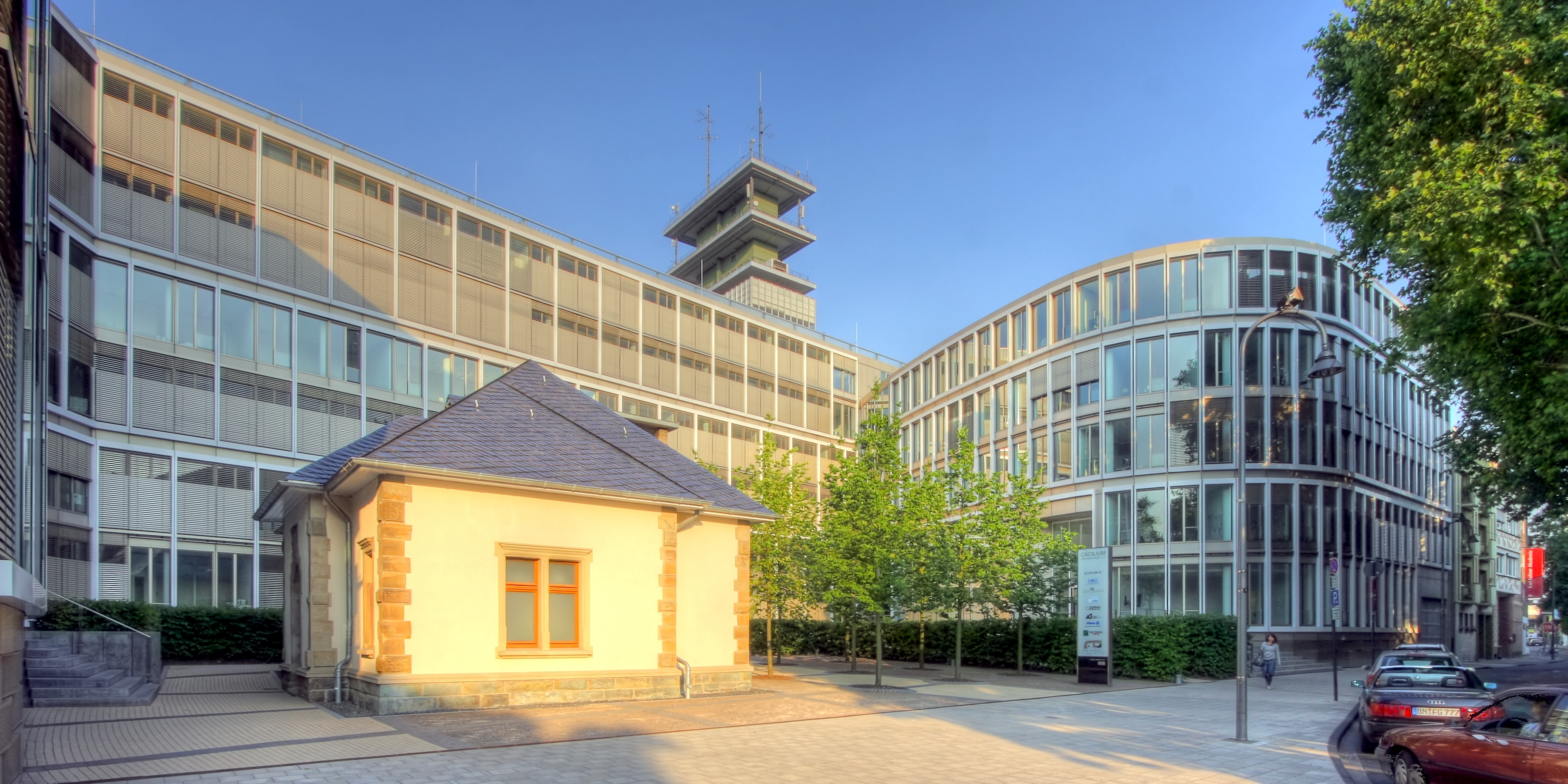 Köln: Bürogebäude Cäcilium, im Vordergrund ein historisches Umspannwerk der GEW im Abendlicht. Cäcilienkloster, 50676 Köln